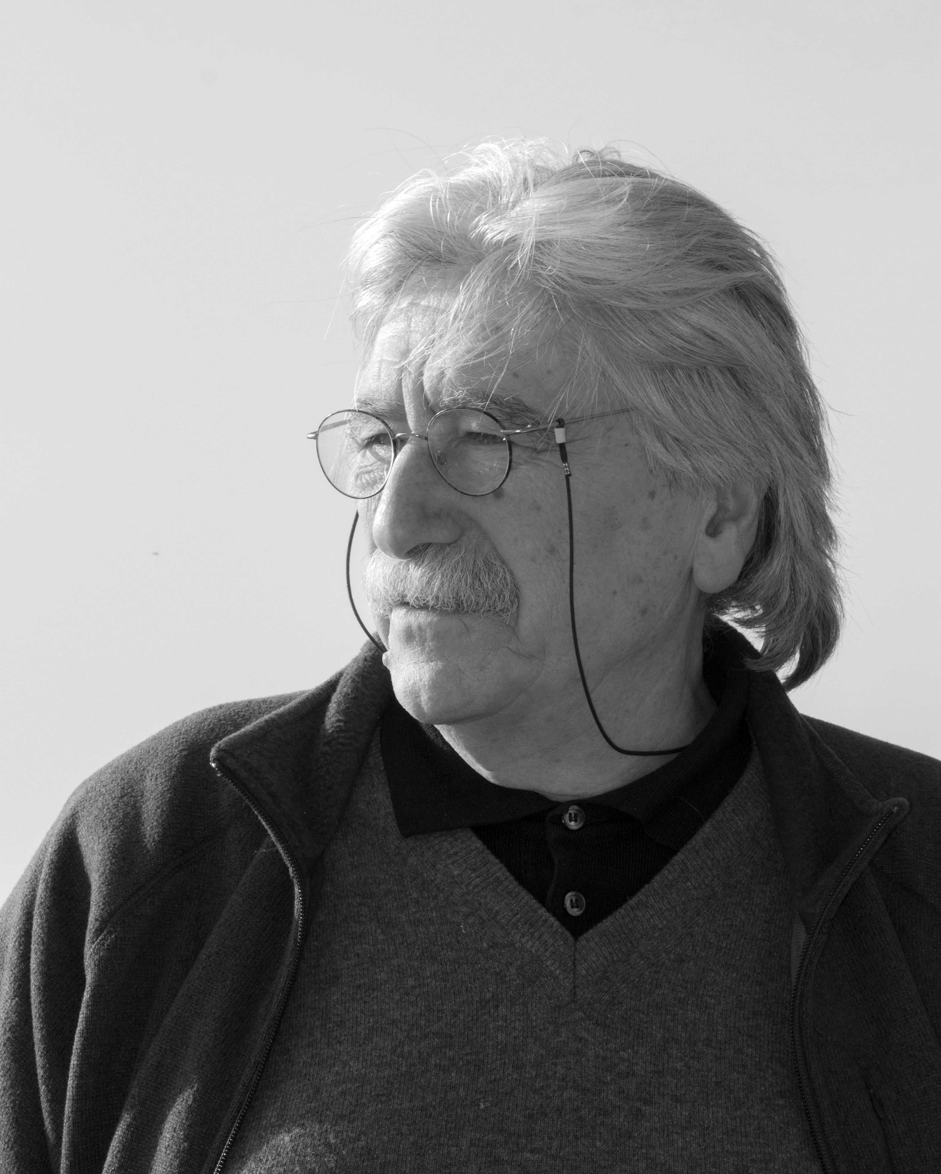 Il pittore Giuseppe Bartolini